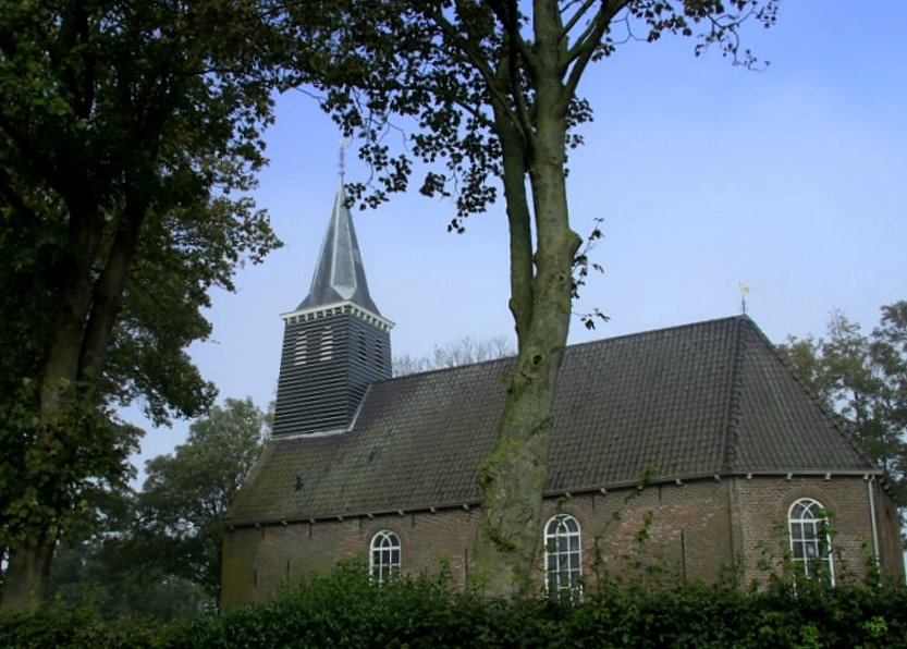 Het kerkje van Tjerkgaast staat in de bomen, het is moeilijk een plekje te vinden om de kerk helemaal in beeld te krijgen.